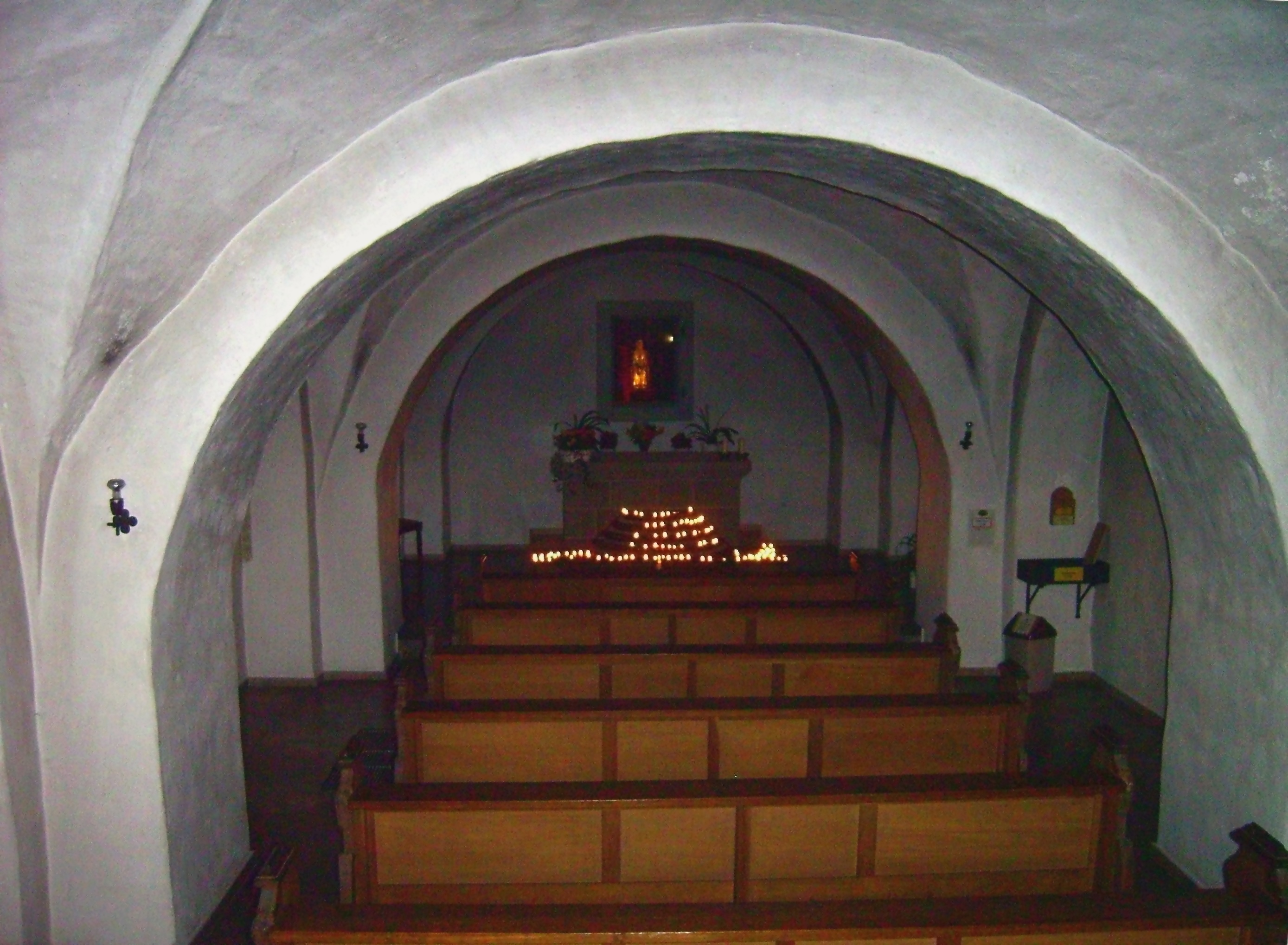 Kloster Oelinghausen - romanische Krypta